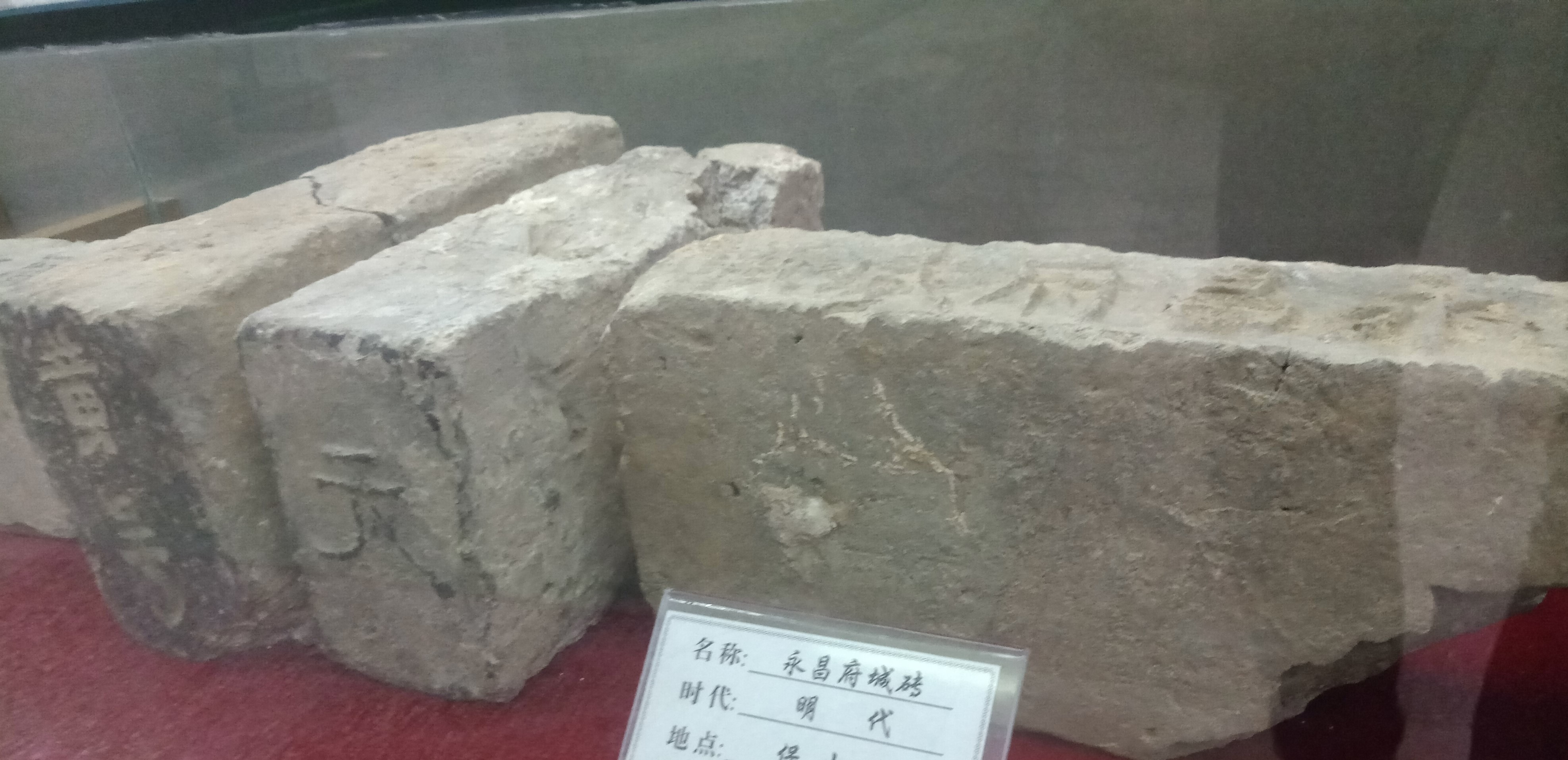 中文（中国大陆）: 保山市博物馆-明-保山城-永昌府城砖